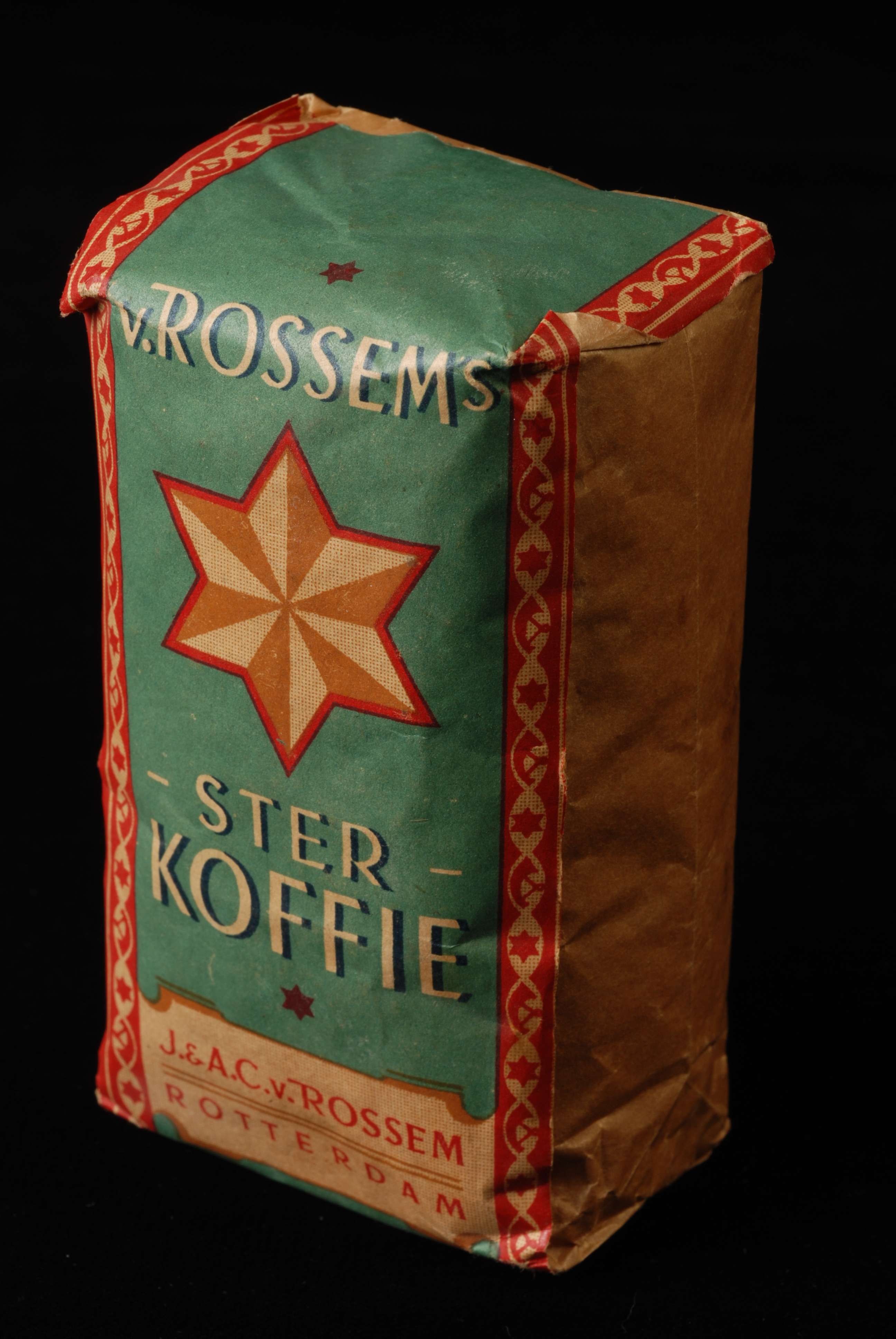 Objectgegevens Titel: Pak koffiebonen van Van Rossem, “STER KOFFIE”, 125 gram Beschrijving: Pak koffiebonen. Bruin papier. Aan de voorkant, onder- en bovenkant beplakt met een blauw/groen etiket. Een ster boven het midden. Versierde biezen langs de randen. Witte en rode belettering. Klein rood/wit etiket aan de achterkant met prijs en inhoud. Herkomst: Bedrijfscollectie De Erven de Wed. J. van Nelle N.V. Deelcollectie: vervalsingen en imitaties van merken en verpakkingen van Van Nelle, door concurrenten. Trefwoorden: pak_koffie, pak, productverpakking, houder Opschrift / merk: Voorkant: "v. ROSSEM´s / STER / KOFFIE / J. & A.C. v. Rossem Rotterdam / ROTTERDAM". Achterkant: "125 GRAM / PRIJS: 41 ct". Vervaardiger: fabrikant: J. & A.C. van Rossem Plaats vervaardiging: Nederland, Rotterdam Datering: 1935 - 1952 Materiaal: papier, karton, plantaardig_materiaal Afmetingen: (cm) hg 11,0 / br 6,5 / dp 5,0 Associatie: verpakken, Van Rossem, koffie, Sterkoffie, Ster, reclame, Van Nelle, Rotterdam Vorm & decoratie: verpakking, ster Inventarisnr: Museum Rotterdam 89440